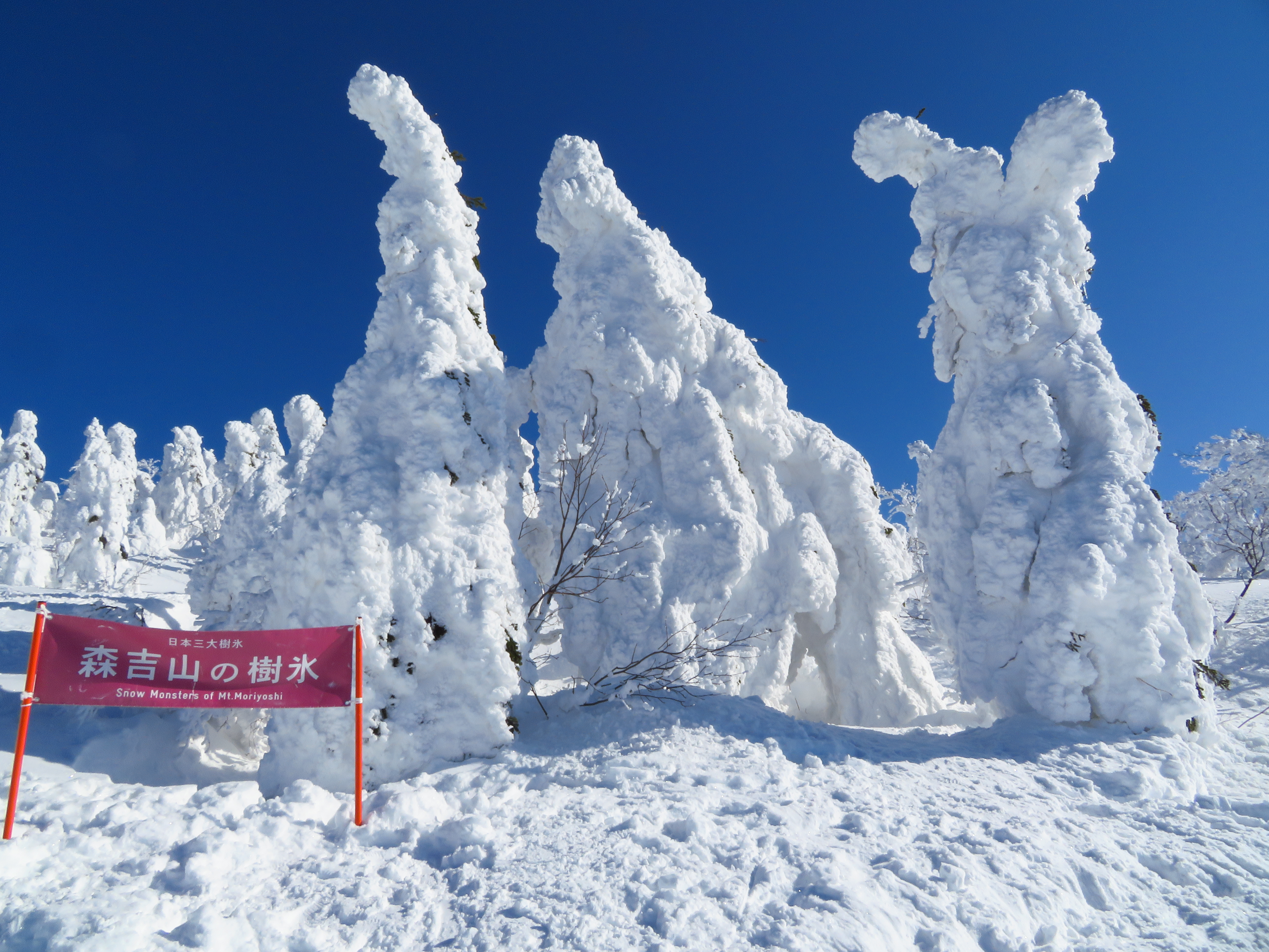 森吉山の樹氷（日本三大樹氷）：秋田県北秋田市 Canon PowerShot SX720 HS